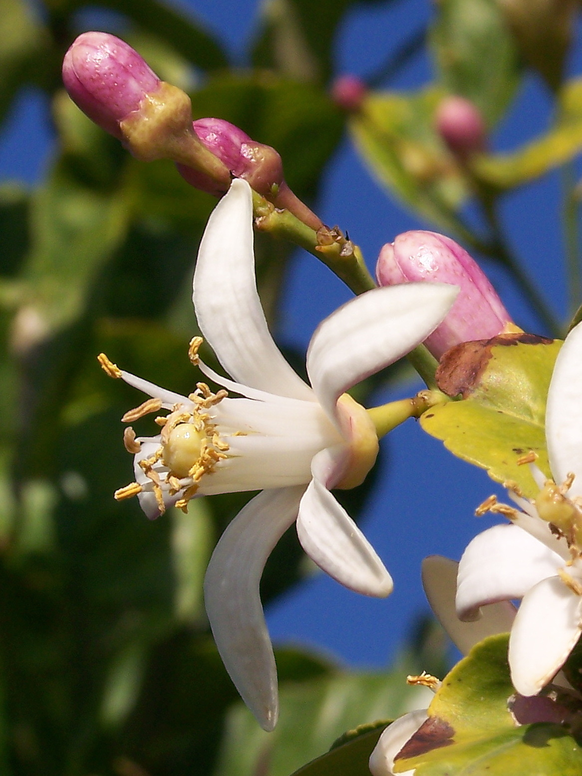 Citrus x limon (Limonero) — flor y capullos - Camino del Derramador de la Algüeda, Albatera (Alicante, España.)